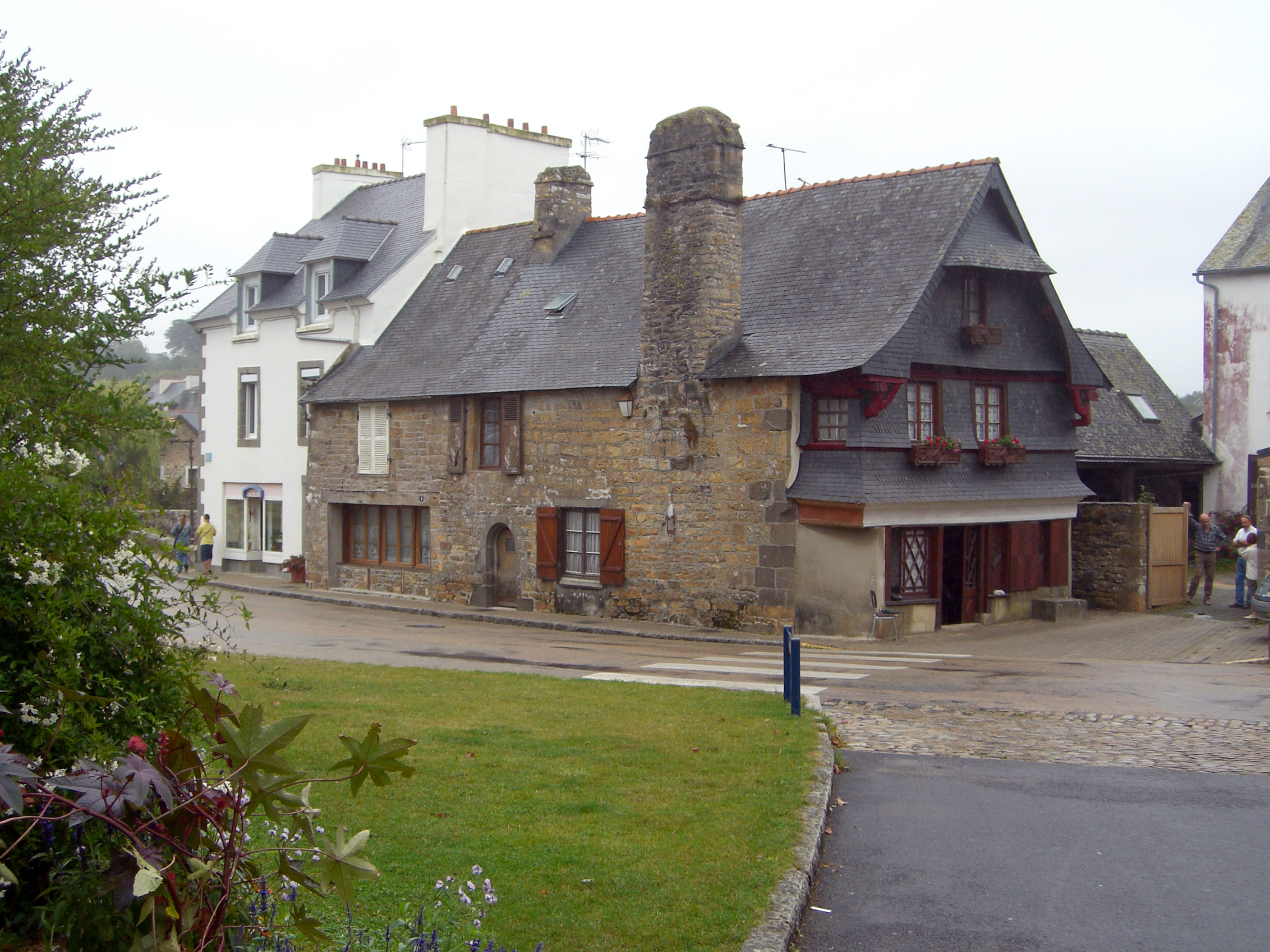 Le Faou, Frankreich